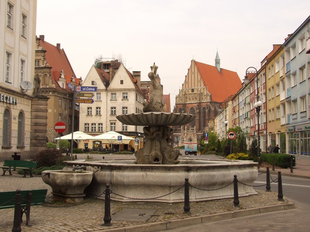 Fontanna Trytona widok z Rynkiem w tle